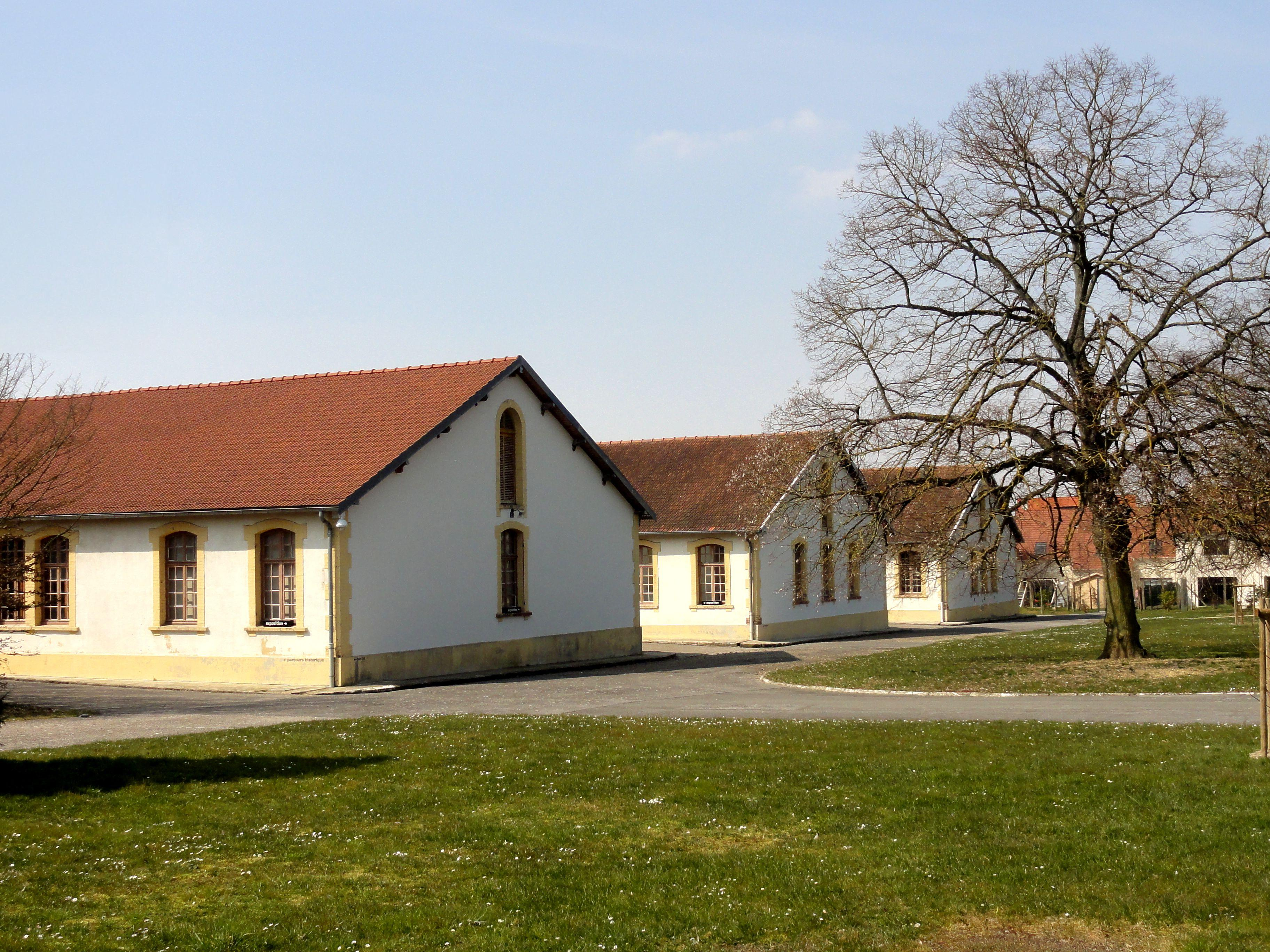 Ancien camp d'internement et de déportation de Royallieu, à Compiègne (Oise).